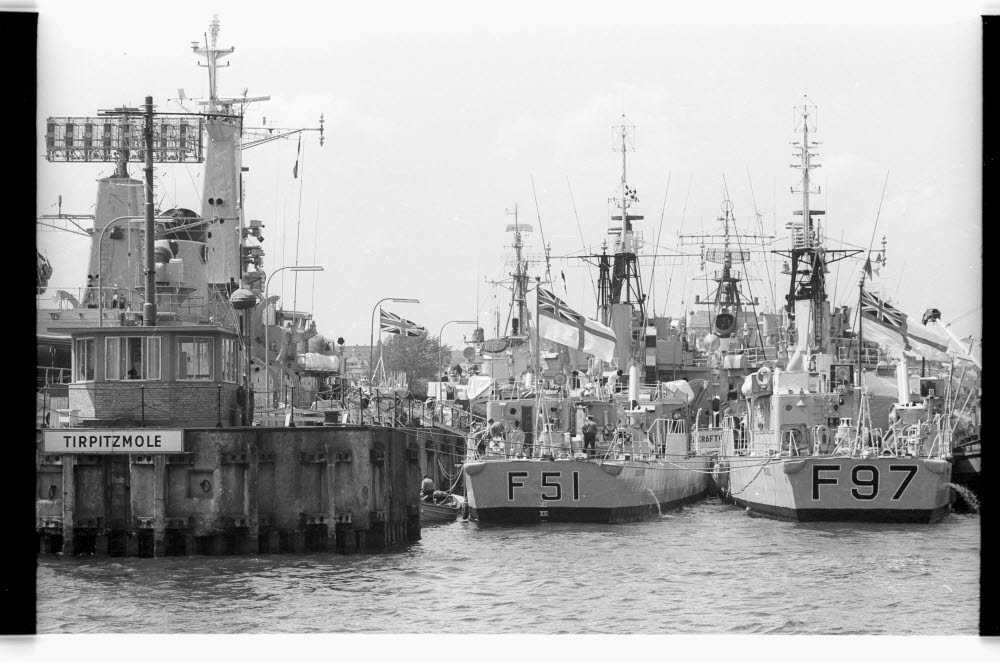 Fregatte GRAFTON (F 51, brit.) und Fregatte RUSSELL (F 97, brit.).